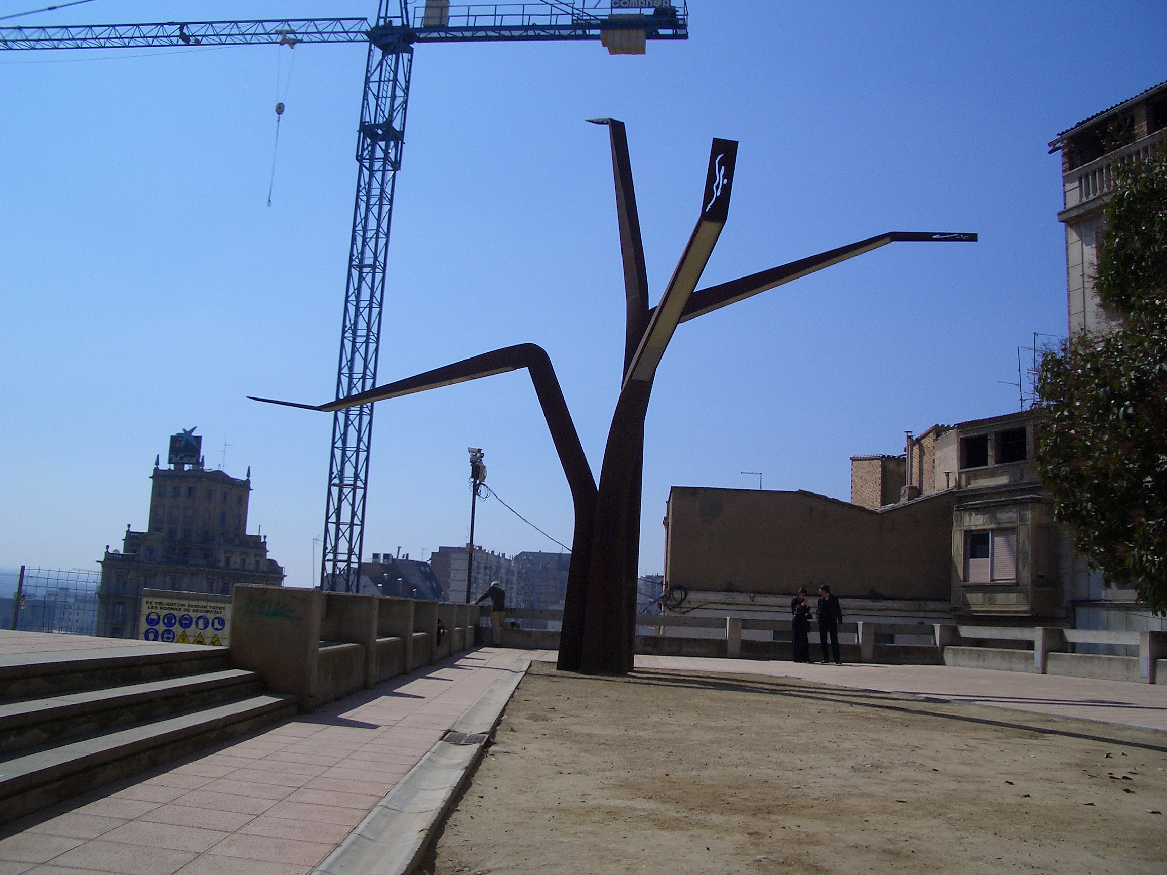 ARBRE PAER, Árbol de paz, Benet Rossell, 1997 Acer corten, bronze i làmpades Condulux Plaça Seminari Vell, Lleida, 1997